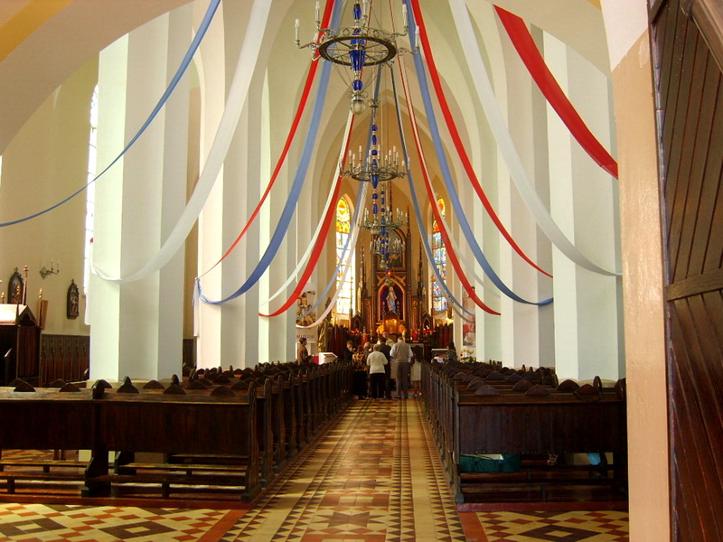 Зэльва. Інтэр'ер касцёла